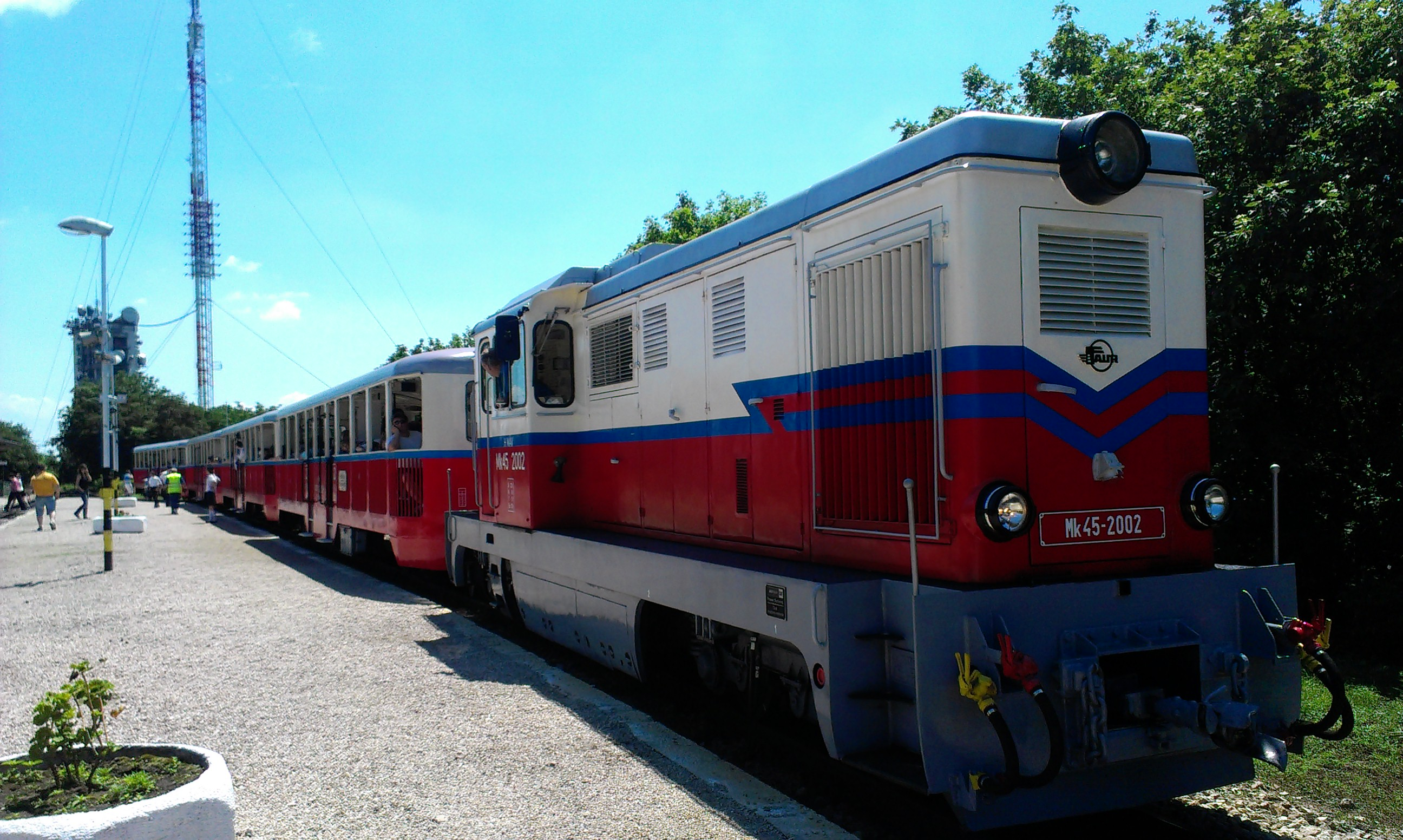 Mk45 2002, Gyermekvasút, Széchenyihegy állomás